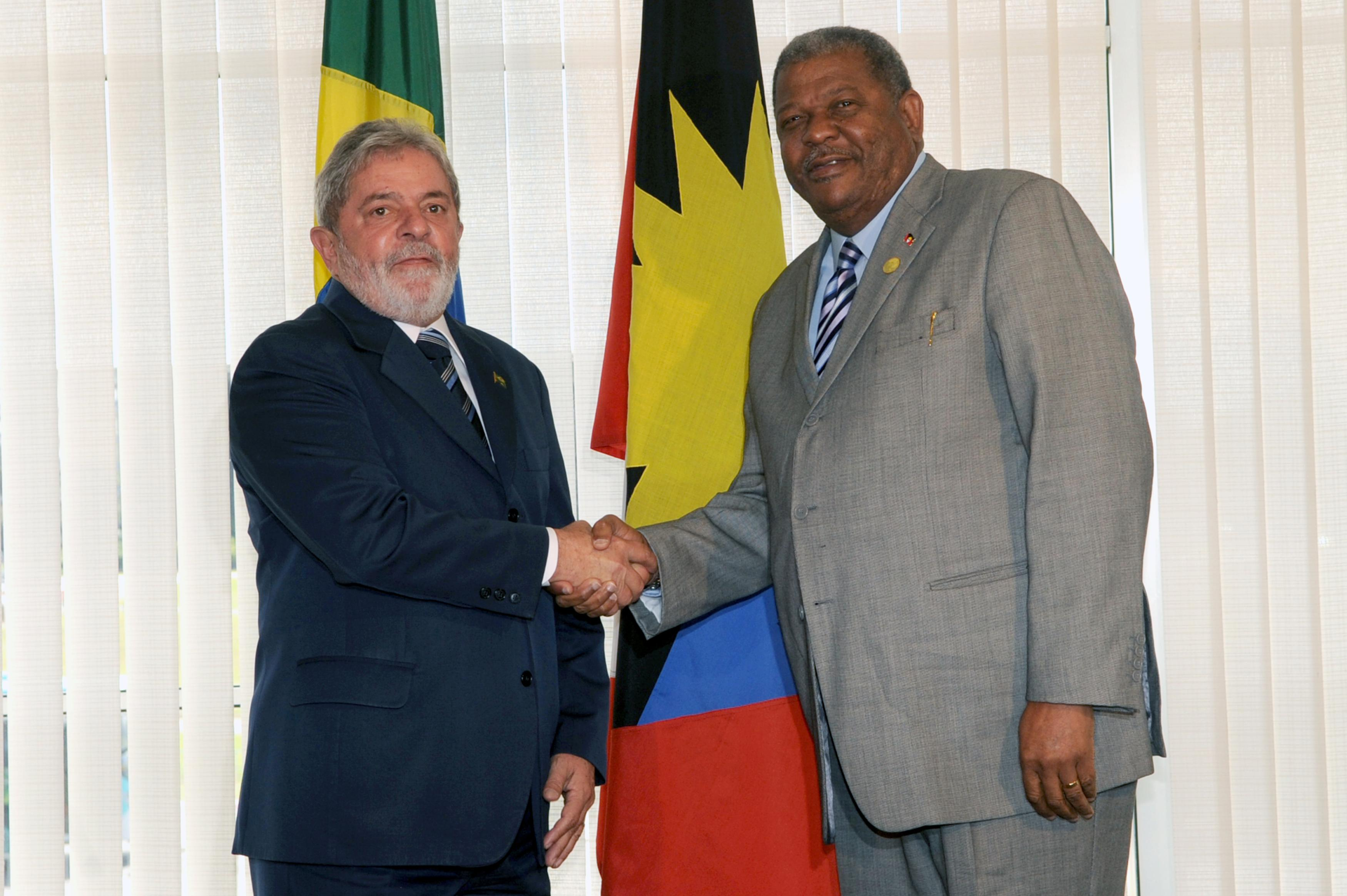 Brasília - O presidente Luiz Inácio Lula da Silva recebe os cumprimentos do primeiro-ministro de Antígua e Barbuda, Winston Baldwin Spencer, que participou da primeira reunião de cúpula do Brasil com chefes de Estado e de Governo da Comunidade do Caribe (Caricom) (Antônio Cruz/ABr)